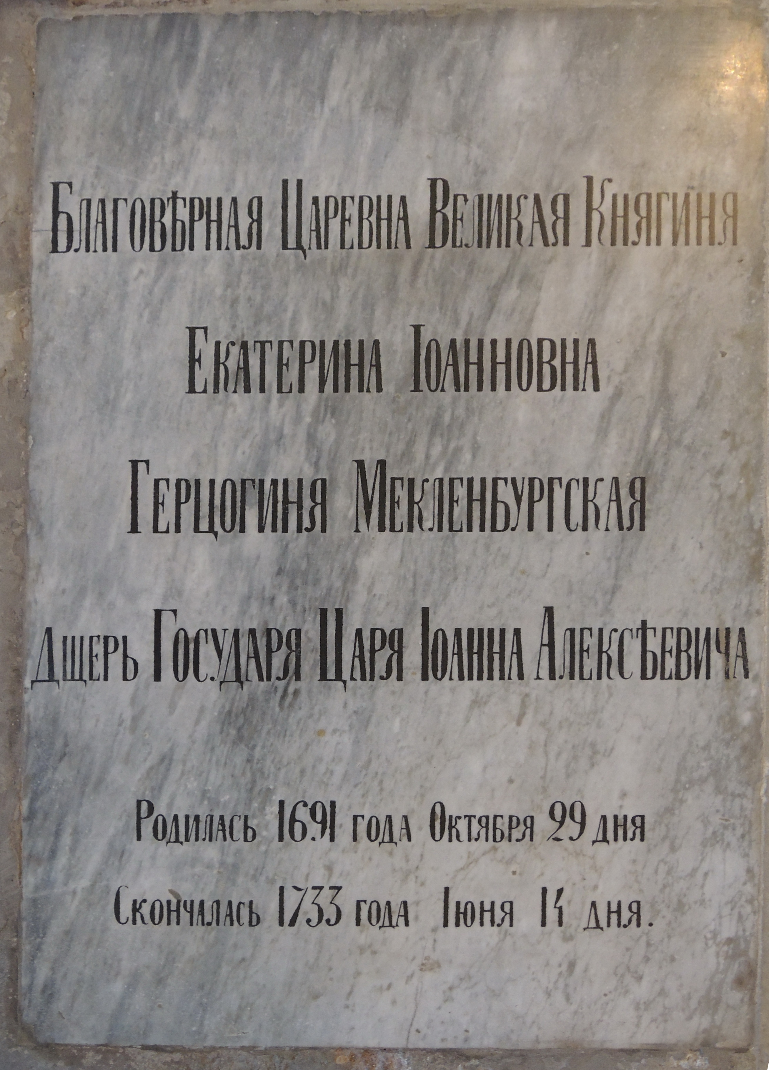 Надгробие в Благовещенской церкви Александро-Невской лавры Екатерина Иоанновна 26.10.1691-14.06.1733 Россия. Санкт-Петербург. Благовещенская усыпальница. Великая княгиня, герцогиня Мекленбургская. Дочь царя Иоанна Алексеевича, племянница Петра I. Напольная плита. Надпись на плите: "Благоверная Царевна Великая Княгиня Екатерина Иоанновна Герцогиня Мекленбургская дщерь Государя Царя Иоанна Алексеевича Родилась 1691 года Октября 29 дня Скончалась 1733 года Июня 14 дня". День рождения 26 октября (по старому стилю). День памяти 14 июня (по старому стилю).